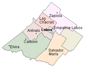 Descripción: Mapa del partido de Lobos con sus divisiones internas. Autor: Lmb. Estatus de copyright: Libre.